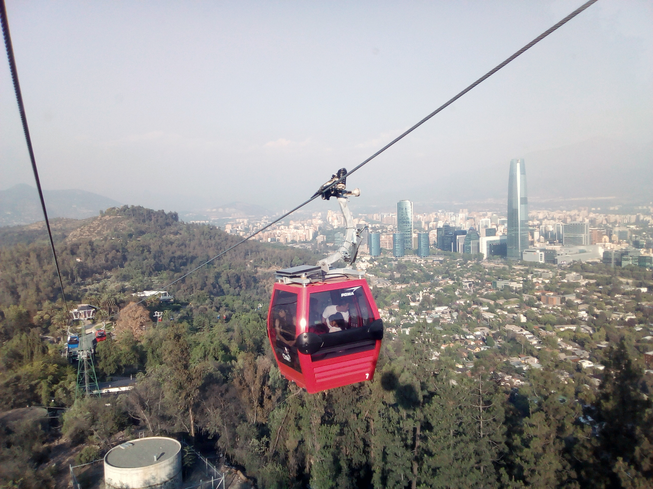 Teleférico del Parque Metropolitano de Santiago, en el Cerro San Cristóbal.